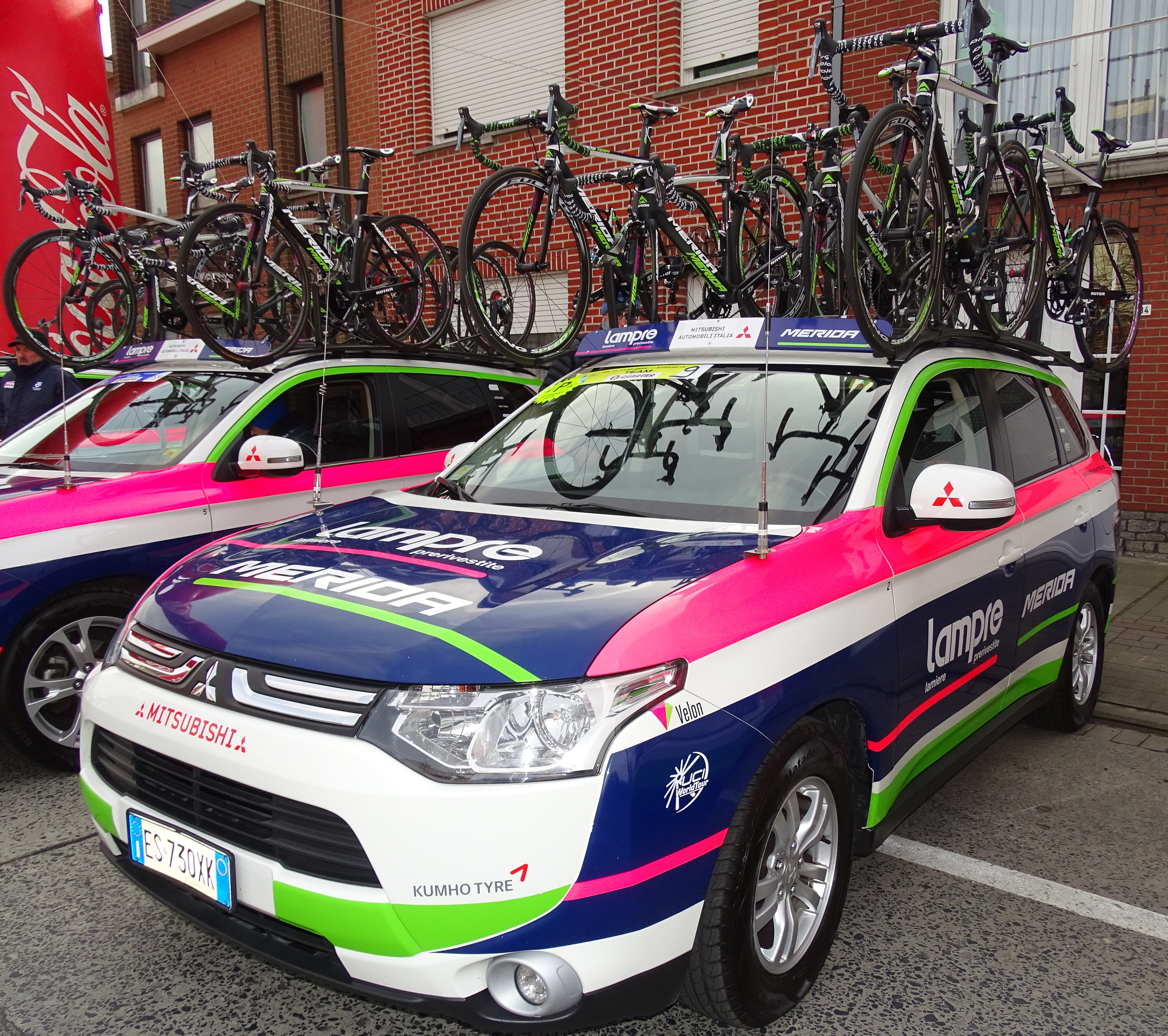 Reportage réalisé le vendredi 27 mars à l'occasion du départ et de l'arrivée du Grand Prix E3 2015 à Harelbeke, Belgique.